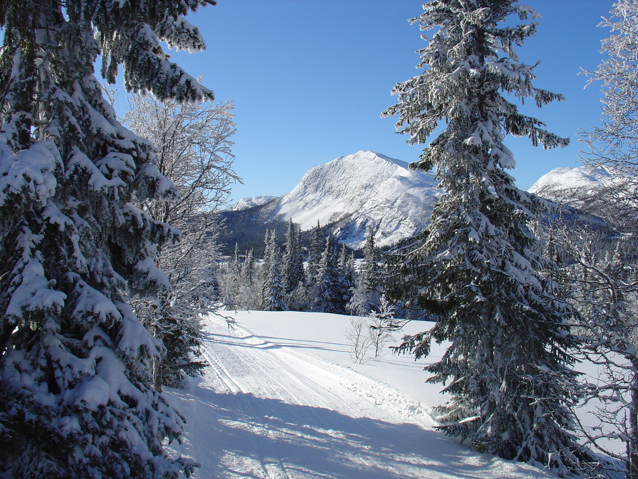 Fjelltoppen Haglebunatten 1278 moh sett fra øst. Norwegian mountaintop (Haglebunatten 1278m) 200 km north west from Oslo near Eggedal.